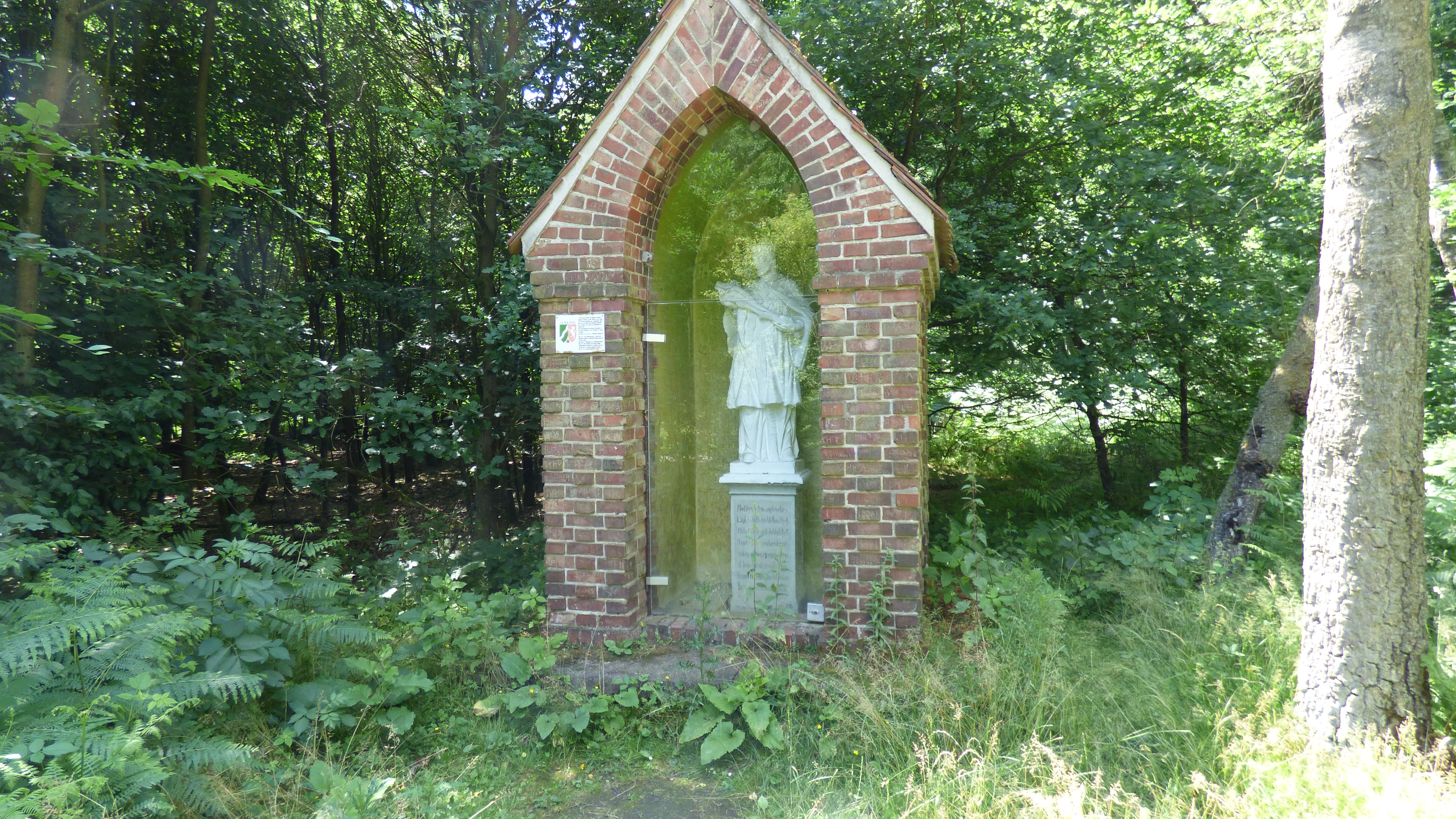 Statue des Hl. Johannes Nepomuk in der HaardThis is a photograph of an architectural monument., no. 1